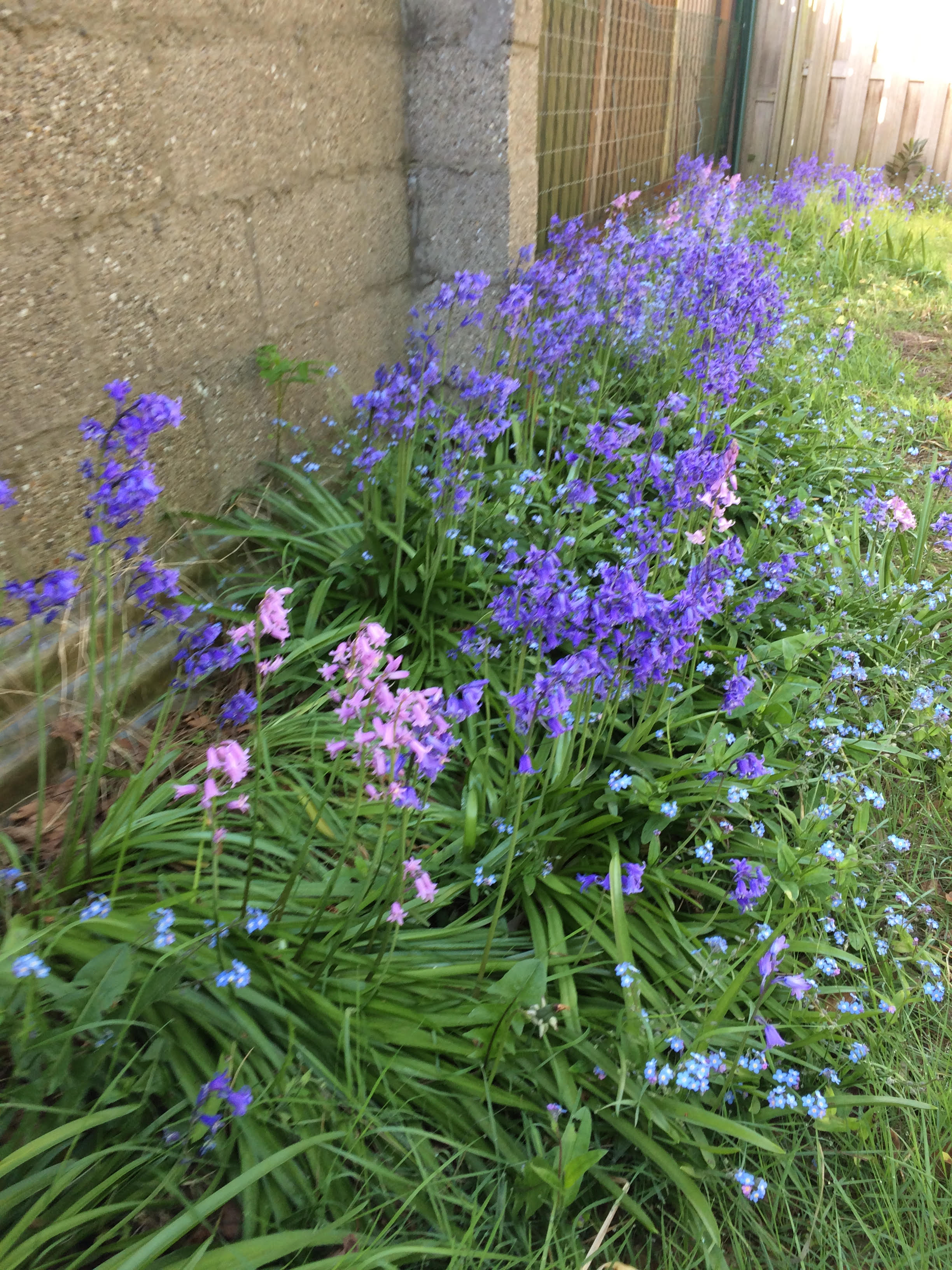 Foto prenita en la ĝardeno de Petro De Smet okaze de vizito